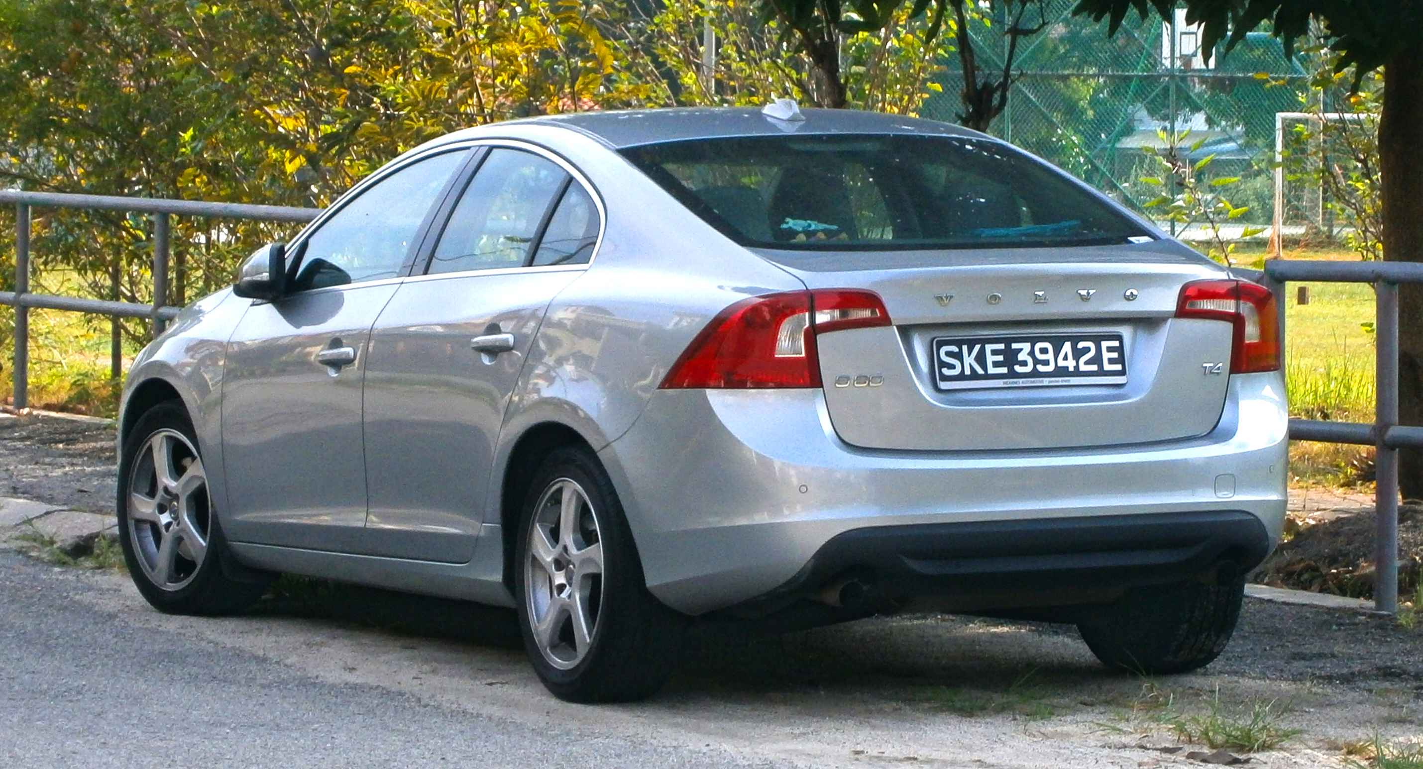 2011 Volvo S60 T4 4-door sedan